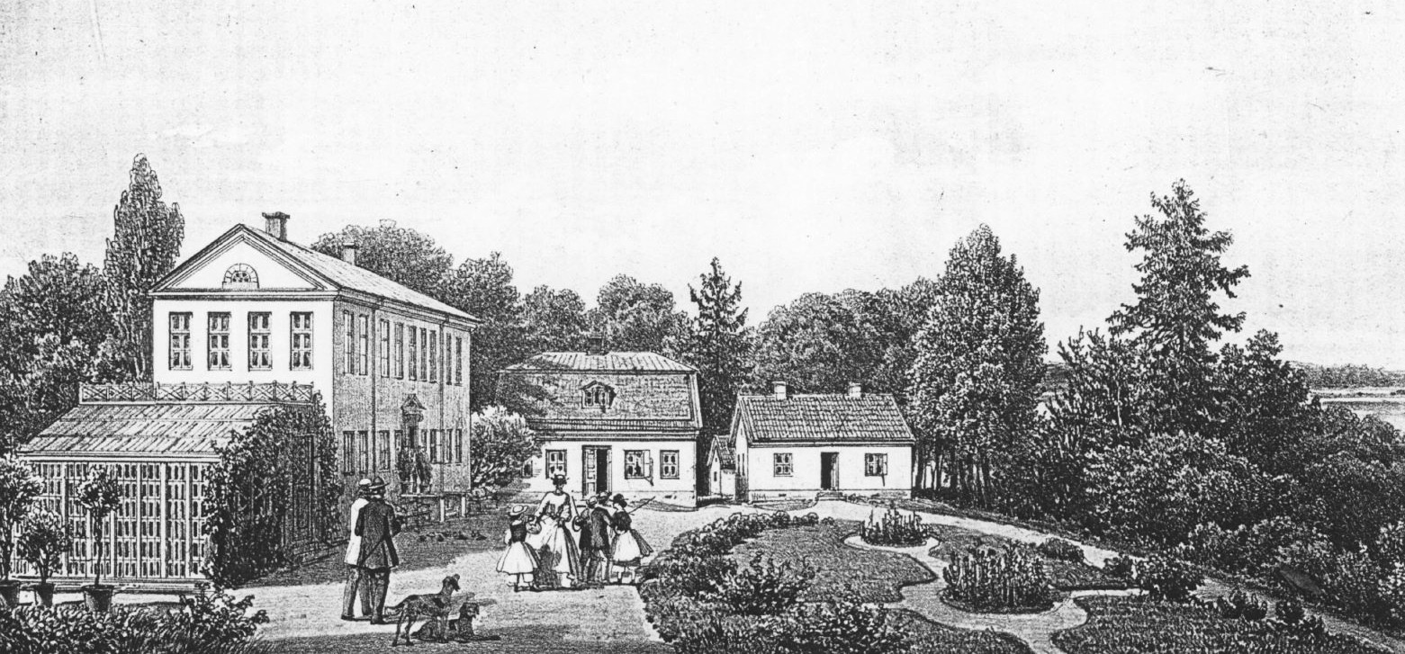 Forsby gård, Österåkers socken, litografi efter R. Richardt